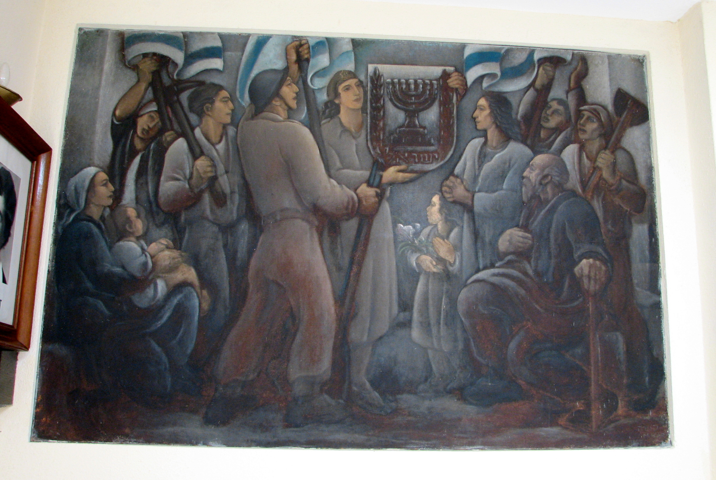 Nesher Cenotaph - Memorial for the sons of the city Nesher fallen in Milhemet HaAtzma'ut האנדרטה לחללי מלחמות ישראל לתושבי נשר בגבעת נשר. לפני מלחמת העצמאות מבנה זה שימש כעמדה מבוצרת להגנה על שכונת נשר שלמרגלות הגבעה. האנדרטה הוקמה ב-1950 ציור בתוך מבנה האנדרטה